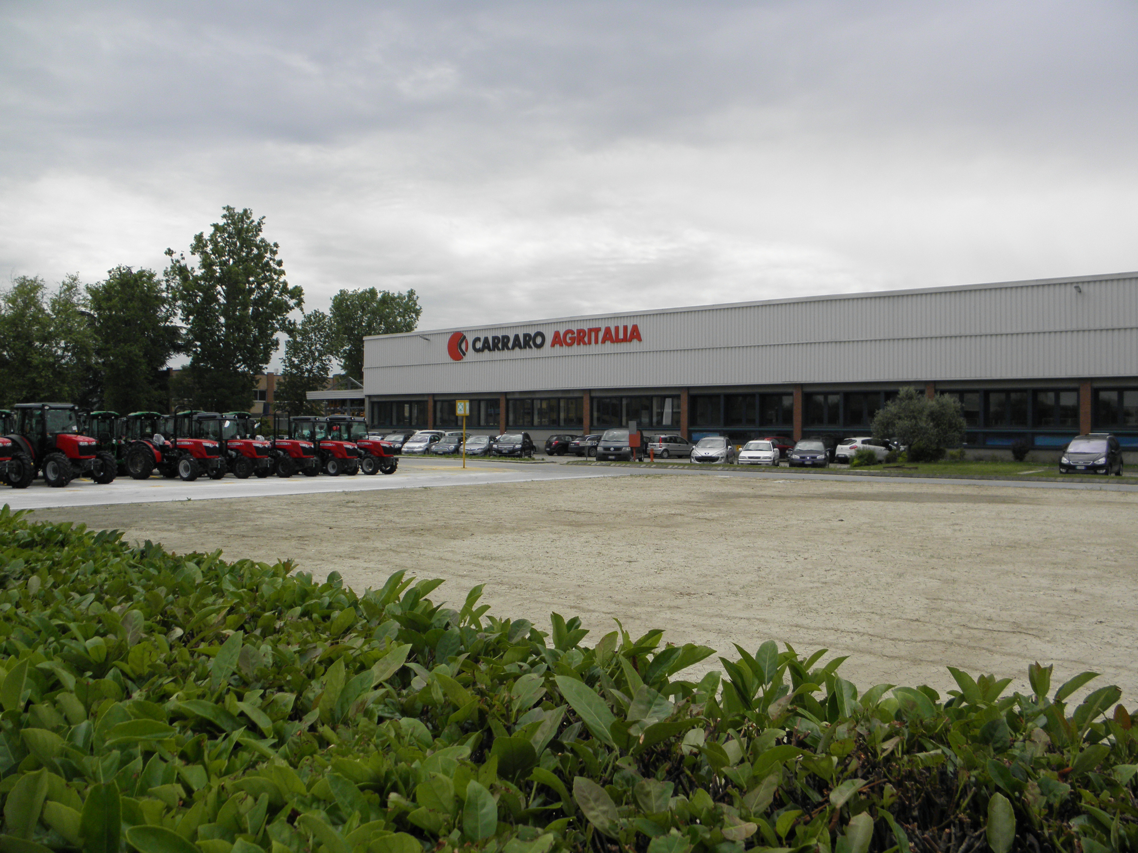 Rovigo, via del Lavoro, la Carraro Agritalia